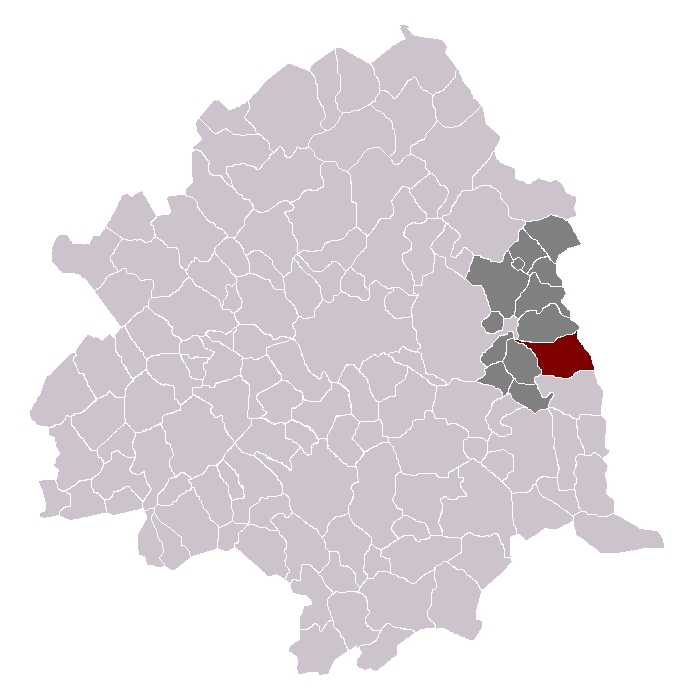 Baisieux dans son canton et son arrondissement.